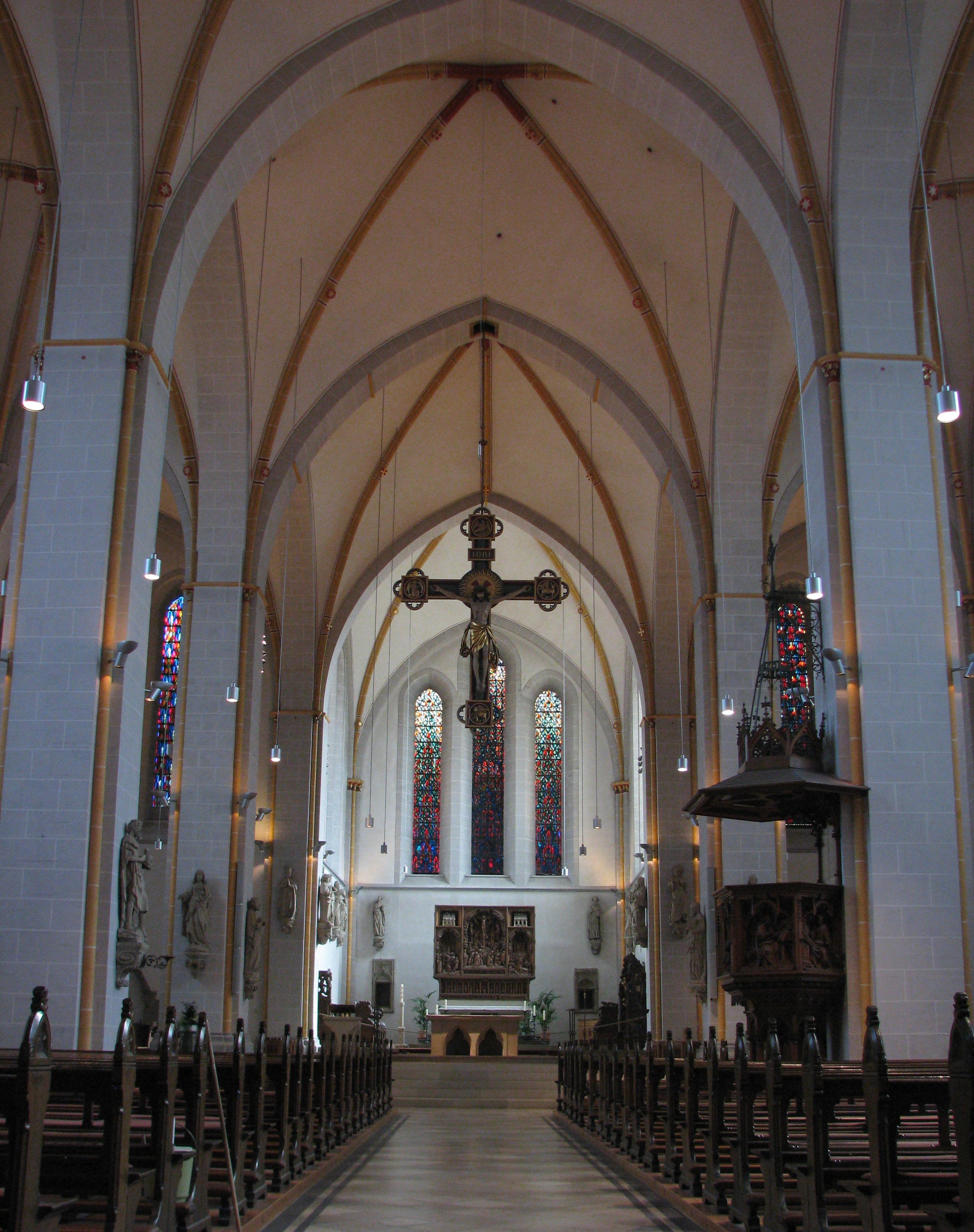 Ansicht der ehemaligen Stiftskirche St. Johann. Heutiger Bau ab 1256 entstanden, erster nachweisbarer Bau 1011. Hallenkirche. Hier Innenansicht zum Chor mit dem Triumphkreuz, der Kanzel und dem Hochaltar von 1512 (Künstler: Meister des Hochaltars der Osnabrücker Johanniskirche).